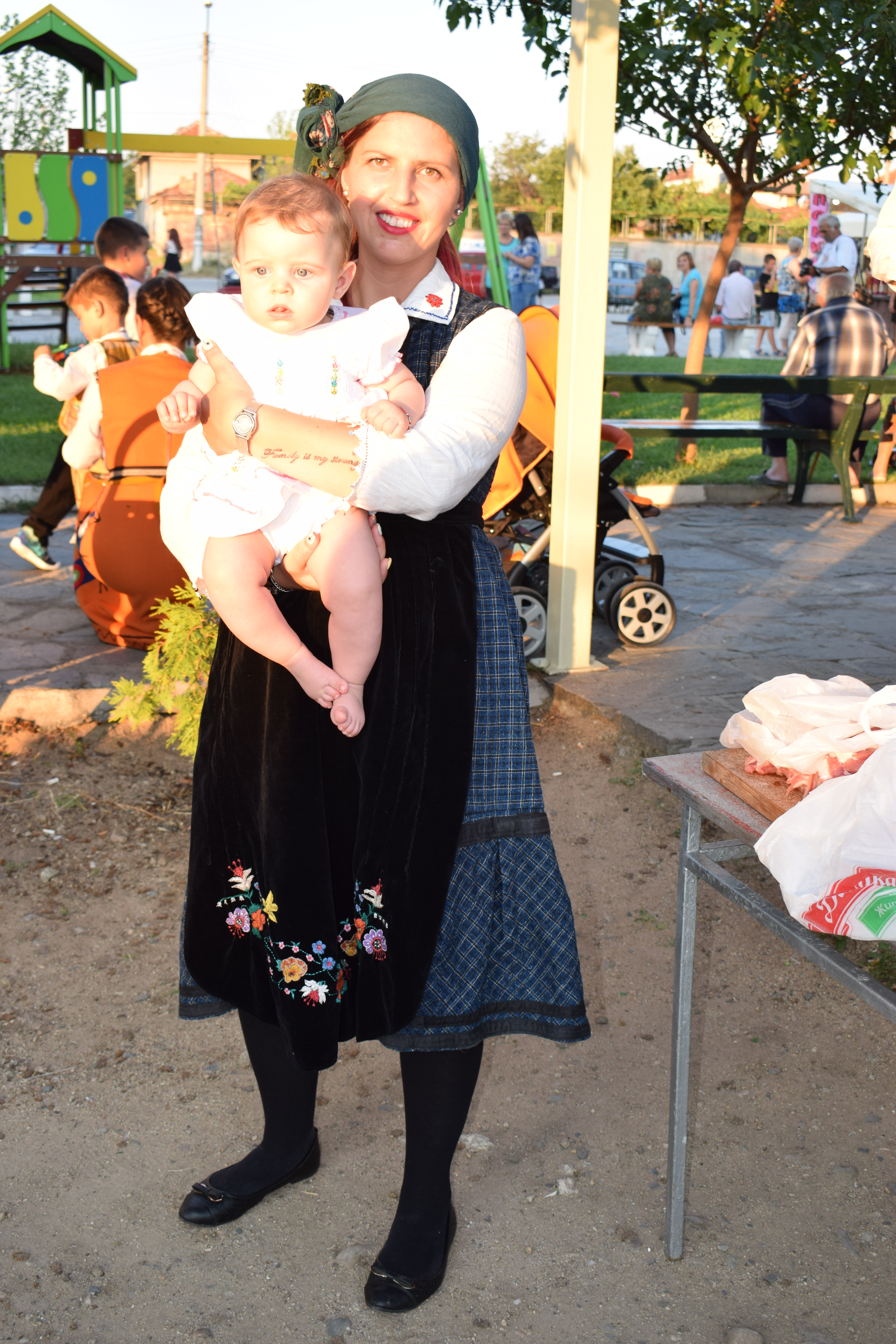 Mother with a child